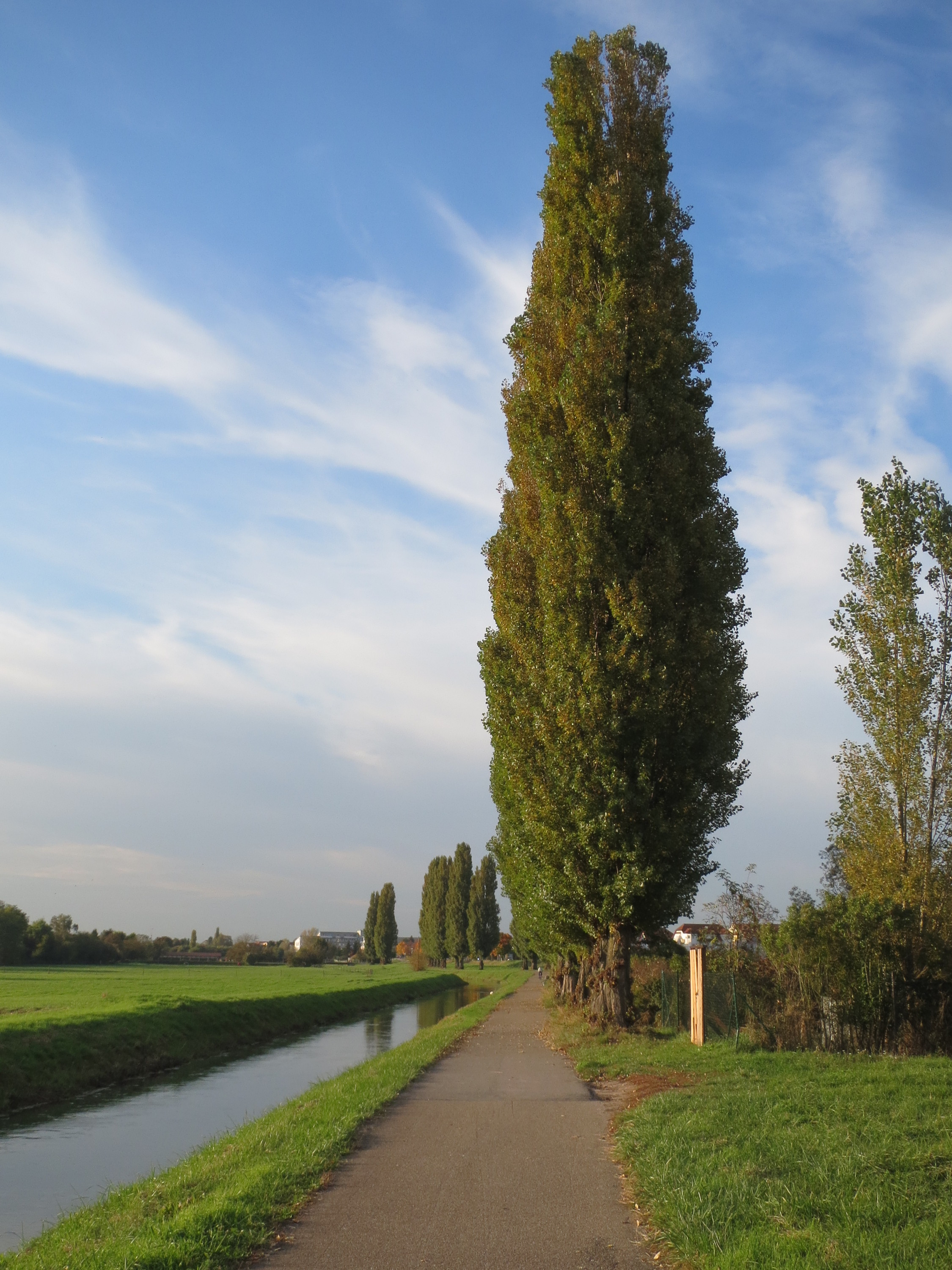 Säulepappeln (Populus nigra 'Italica') am Kraichbach bei Hockenheim